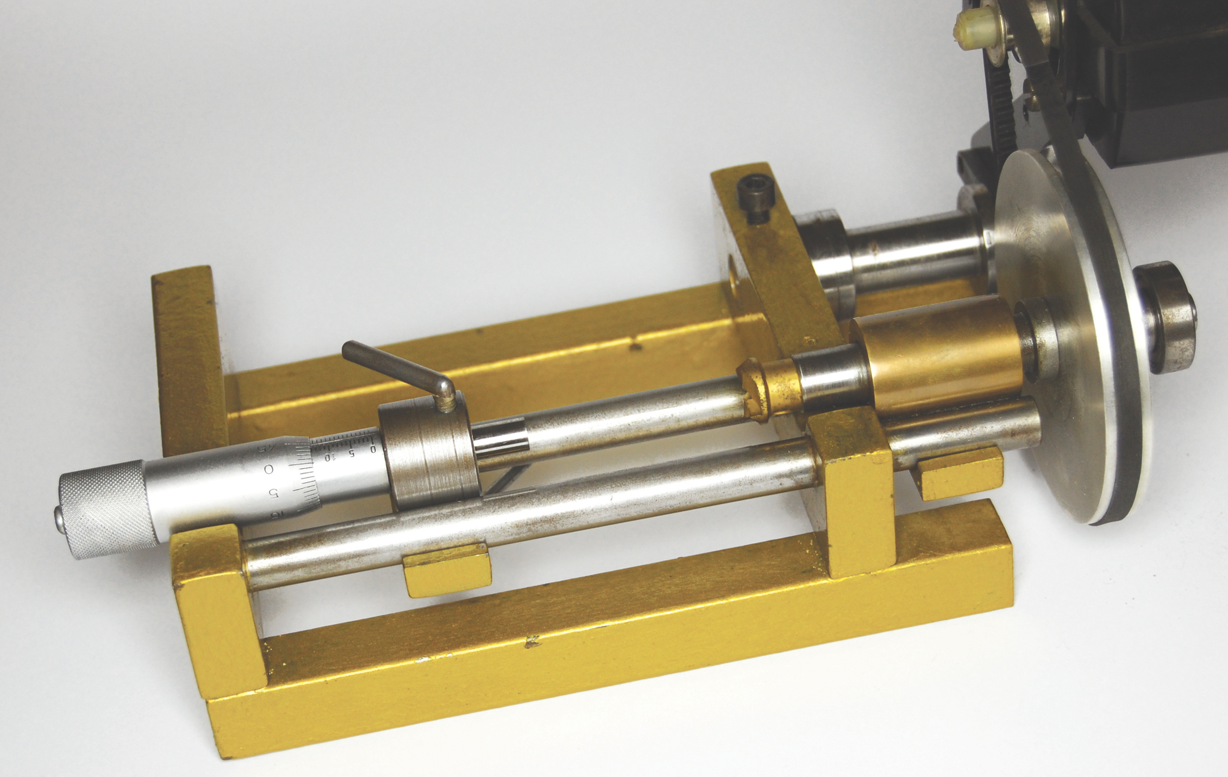 Trimmer elektryczny